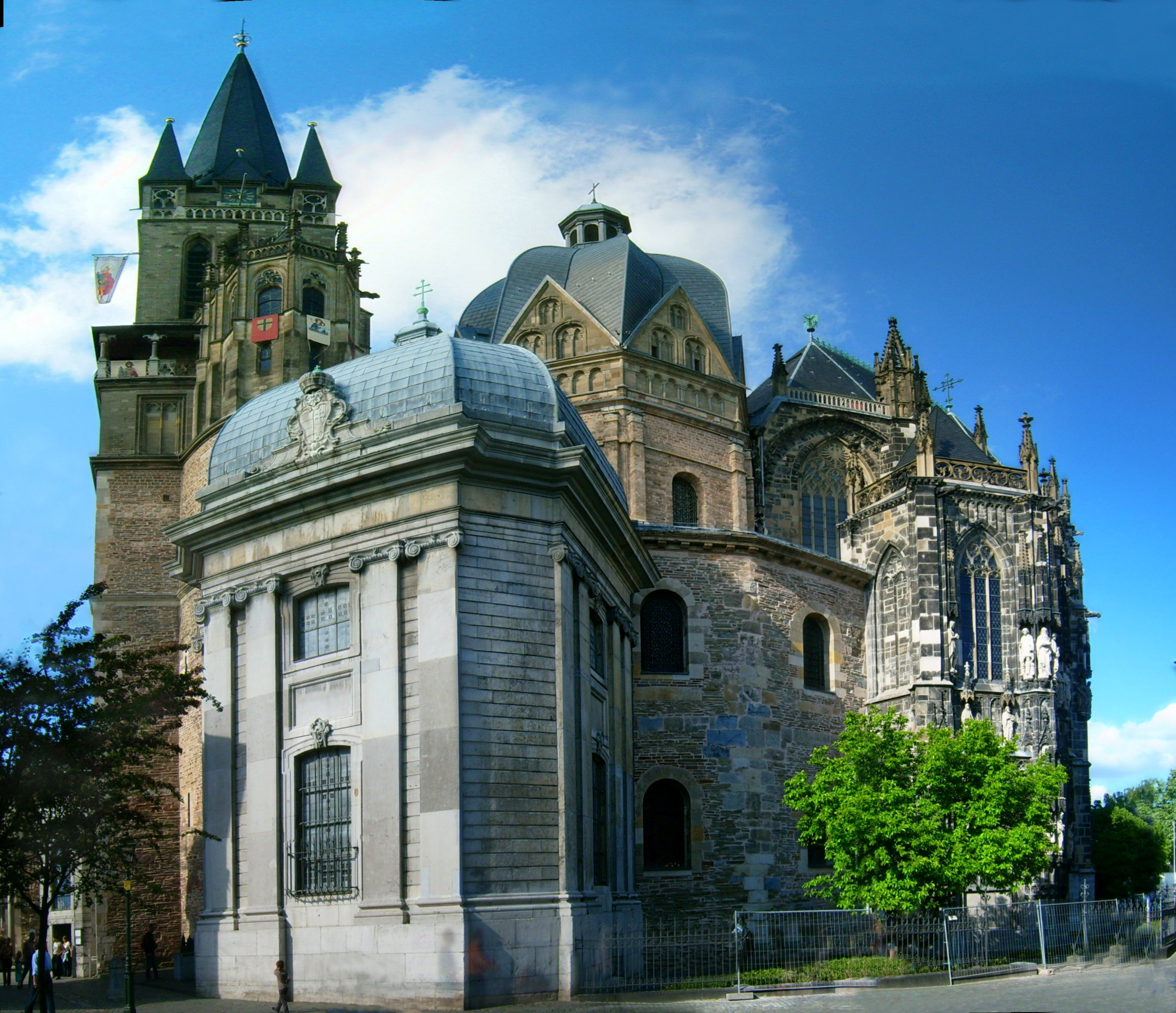 Aachener Dom vom Münsterplatz